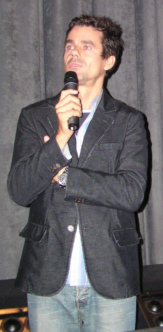 Tom Tykwer im September 2006 "Sternenpalast" in Biberach/Riß beim Publikumsgespräch